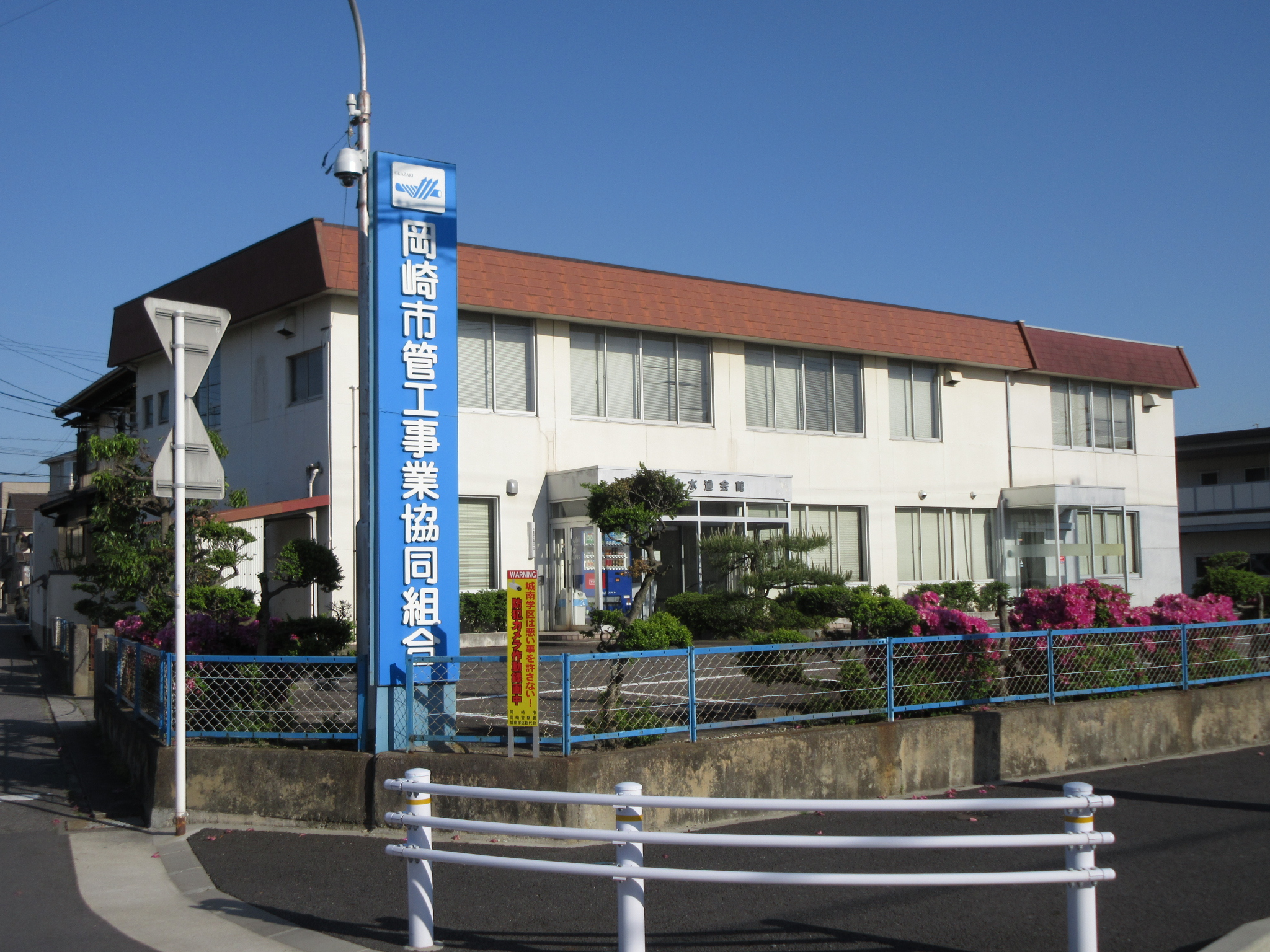 岡崎市管工事業協同組合（岡崎市江口）